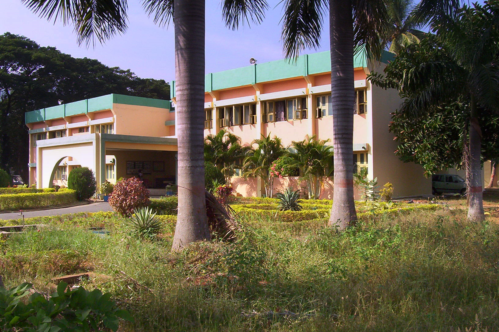 Delhi Public School Visakhapatnam